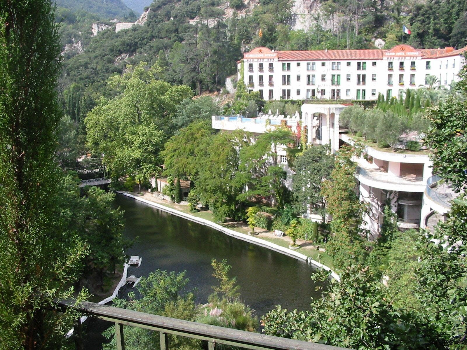 Molitg-les-Bains, Pyrénées-Orientales, France